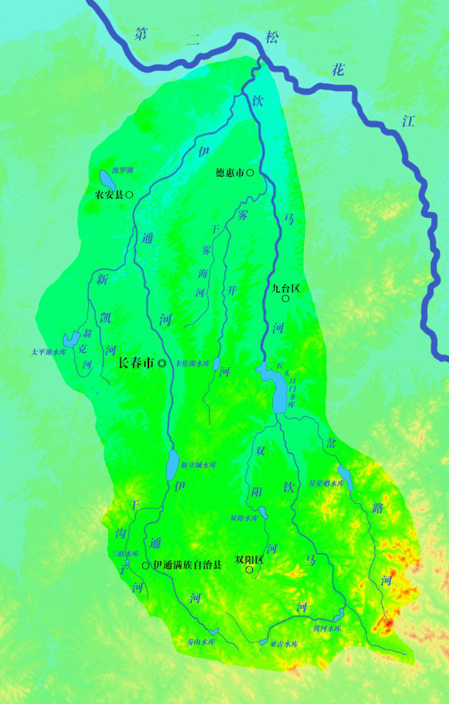 饮马河流域地图。根据《中国河湖大典·黑龙江 辽河卷》绘制